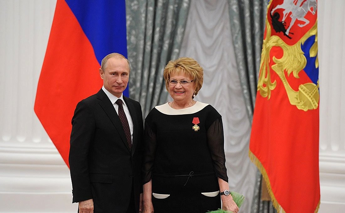 Орденом «За заслуги перед Отечеством» IV степени награждена Людмила Швецова